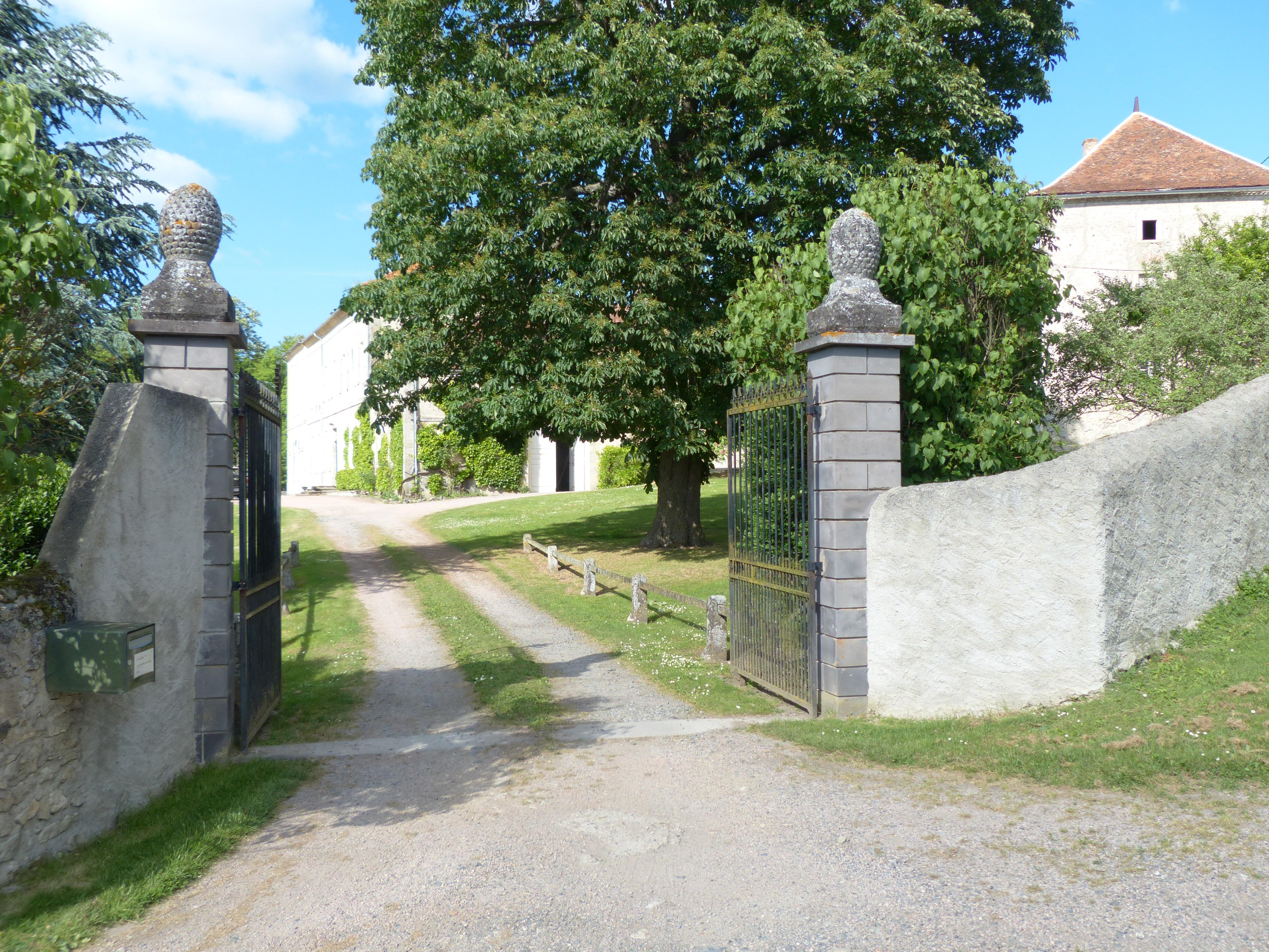 Broût-Vernet (Allier, France). Château de Fouranges. Portail d'entrée.